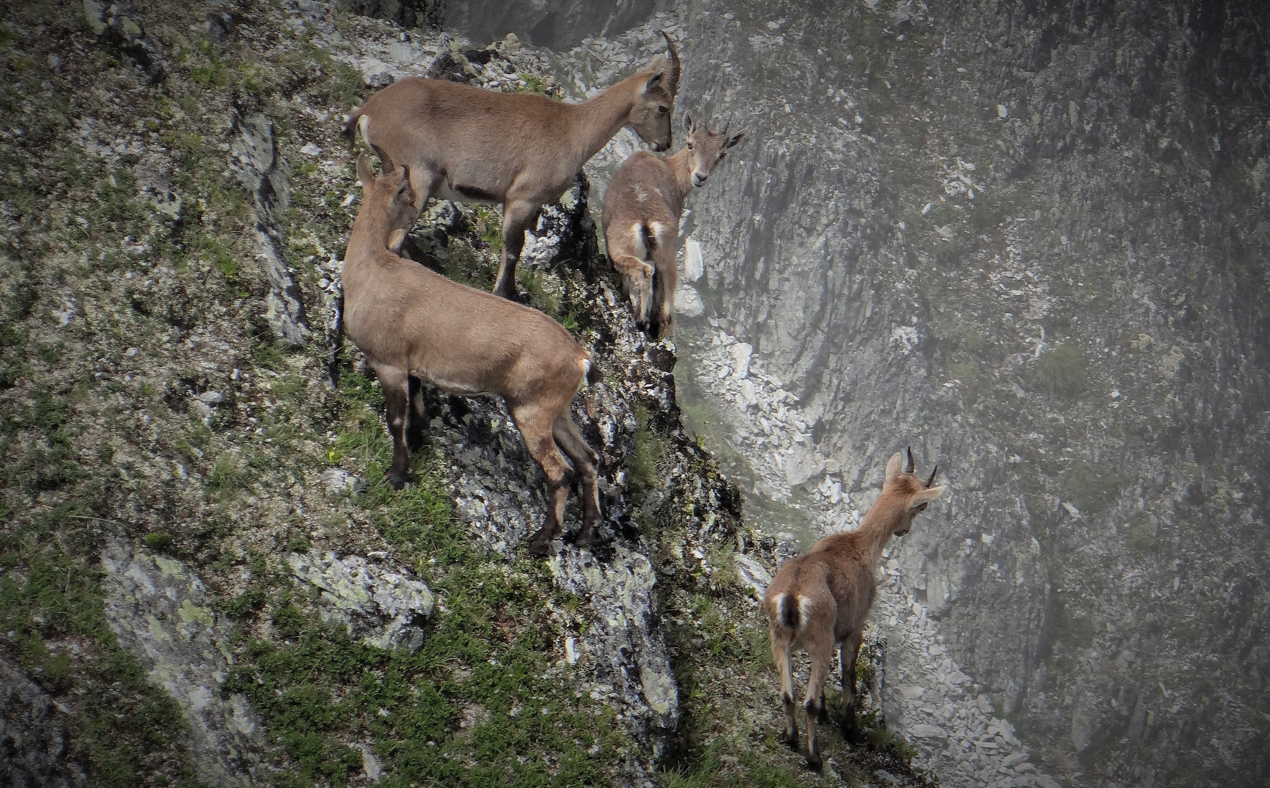 Etagnes et leurs cabris aux Rochers de la Place(2622m)